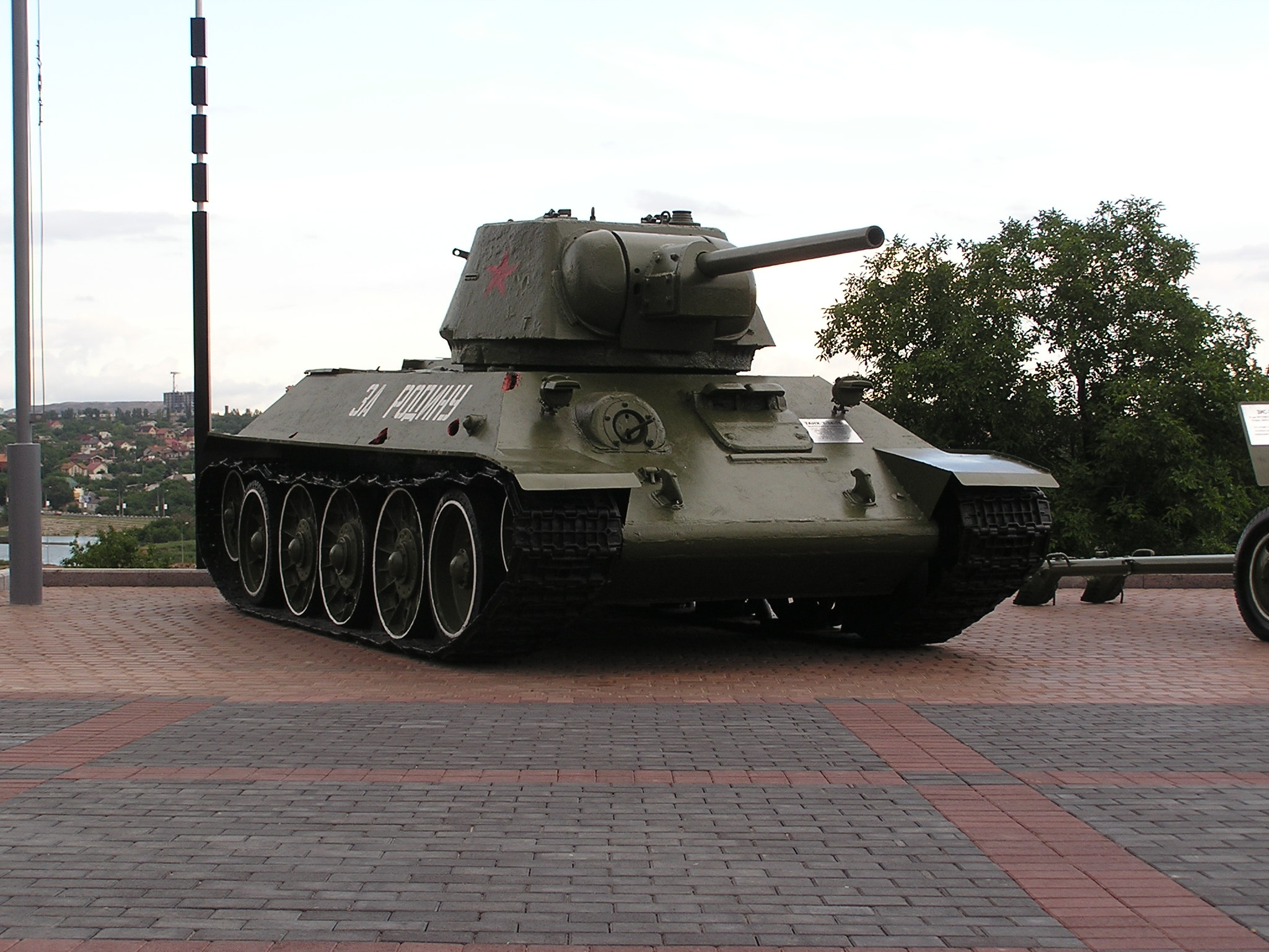 Донецк. Парк культуры и отдыха имени Ленинского комсомола